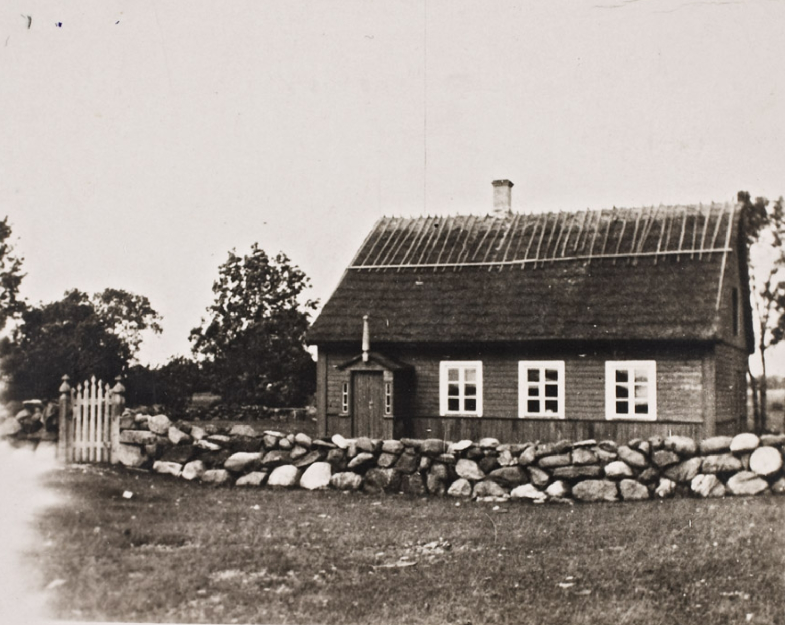 Koolimaja Osmussaarel